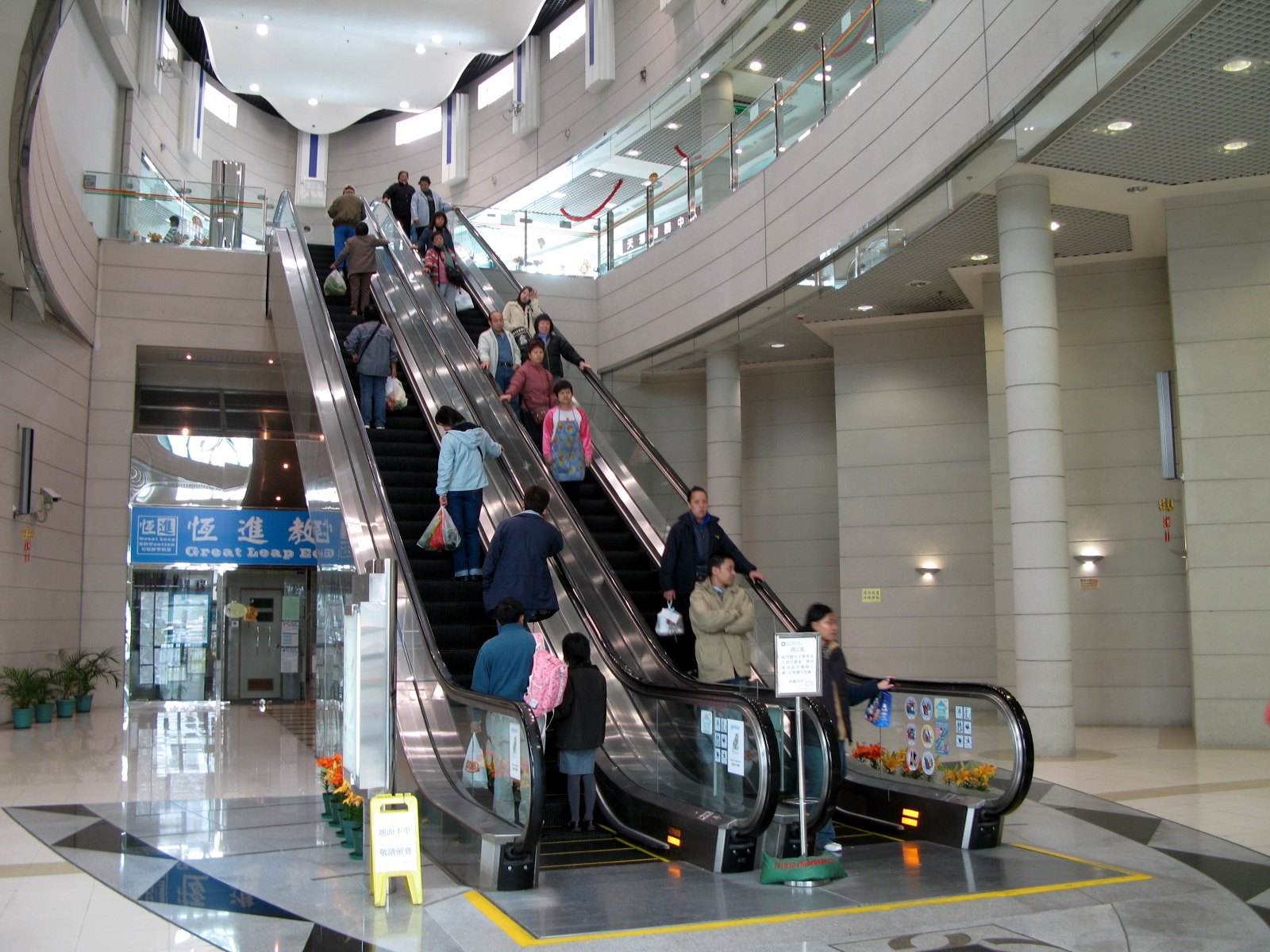 Tin Yan Estate Shopping Mall